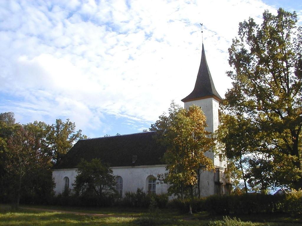 Ēveles luterāņu baznīca. 2004-09-25